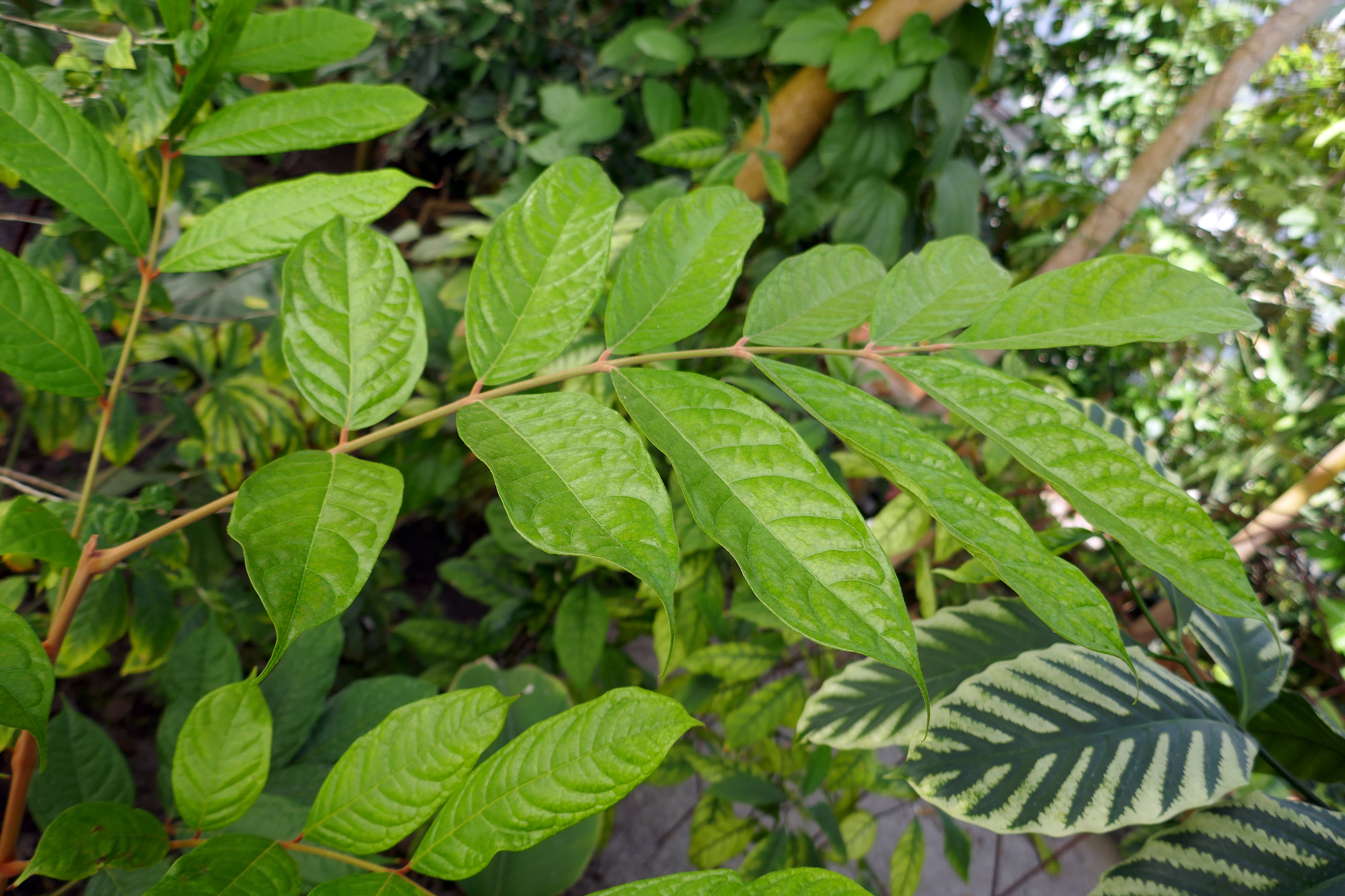 Dacryodes edulis (G.Don) Lam. fr: safoutier Afrique tropicale centrale et occidentale. Jardin botanique Meise (Belgique)